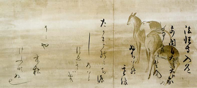 Calligrafia del Shin Kokin Wakashū